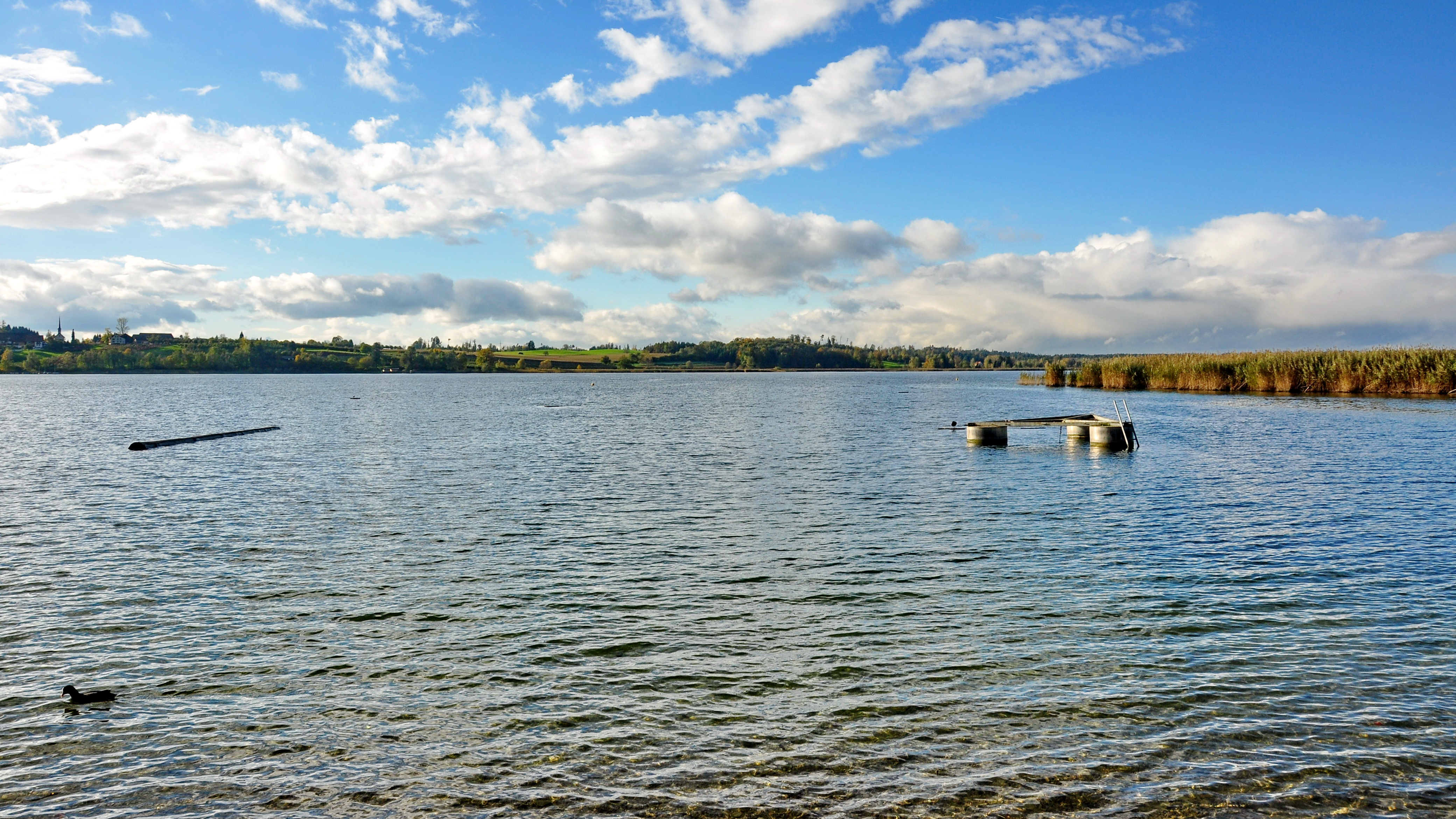 Pfäffikersee (Lake Pfäffikon) at the lido (Strandbad) in Auslikon (Switzerland)